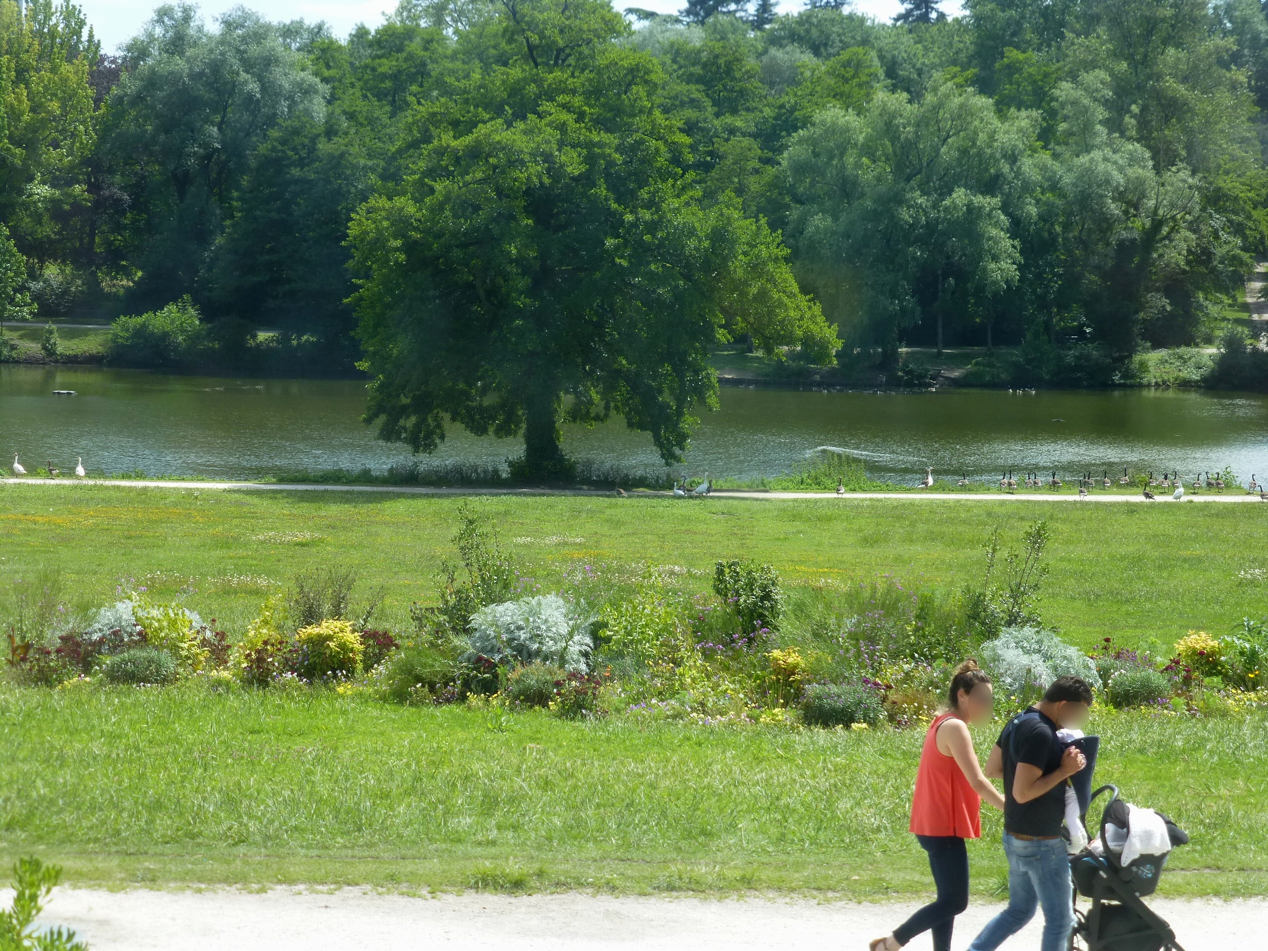 Le parc de Bourran à Mérignac-33, vu depuis l'ESPE (Château de Bourran) ː aulne glutineux au bord de l'étang.